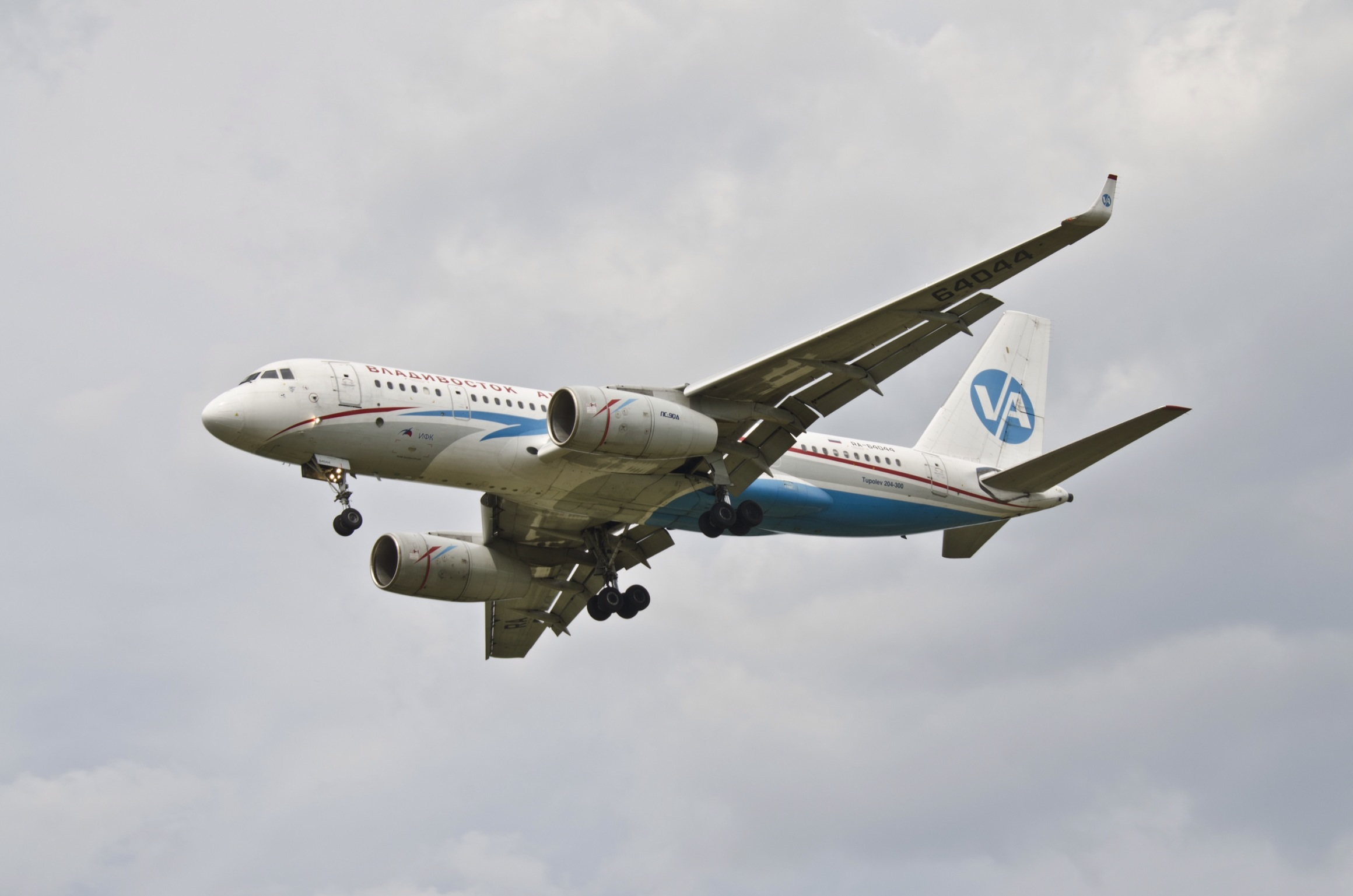 Заход Ту 204-300 на посадку в аэропорт Шереметьево